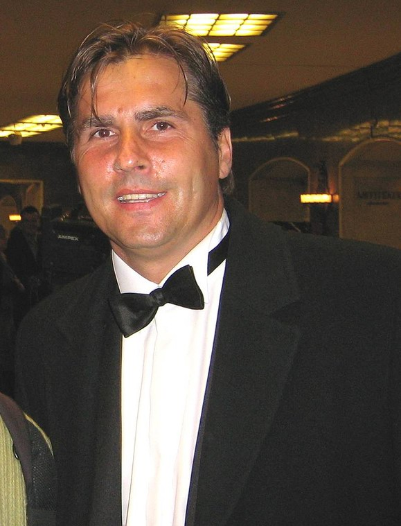 Dariusz Paweł Dziekanowski, pseud. Dziekan (ur. 30 września 1962 w Warszawie), polski piłkarz i trener.